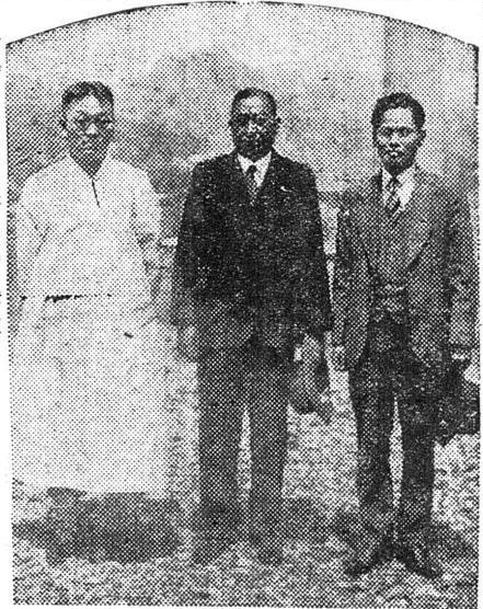 송진우, 최승만, 인도의 독립지사 포스